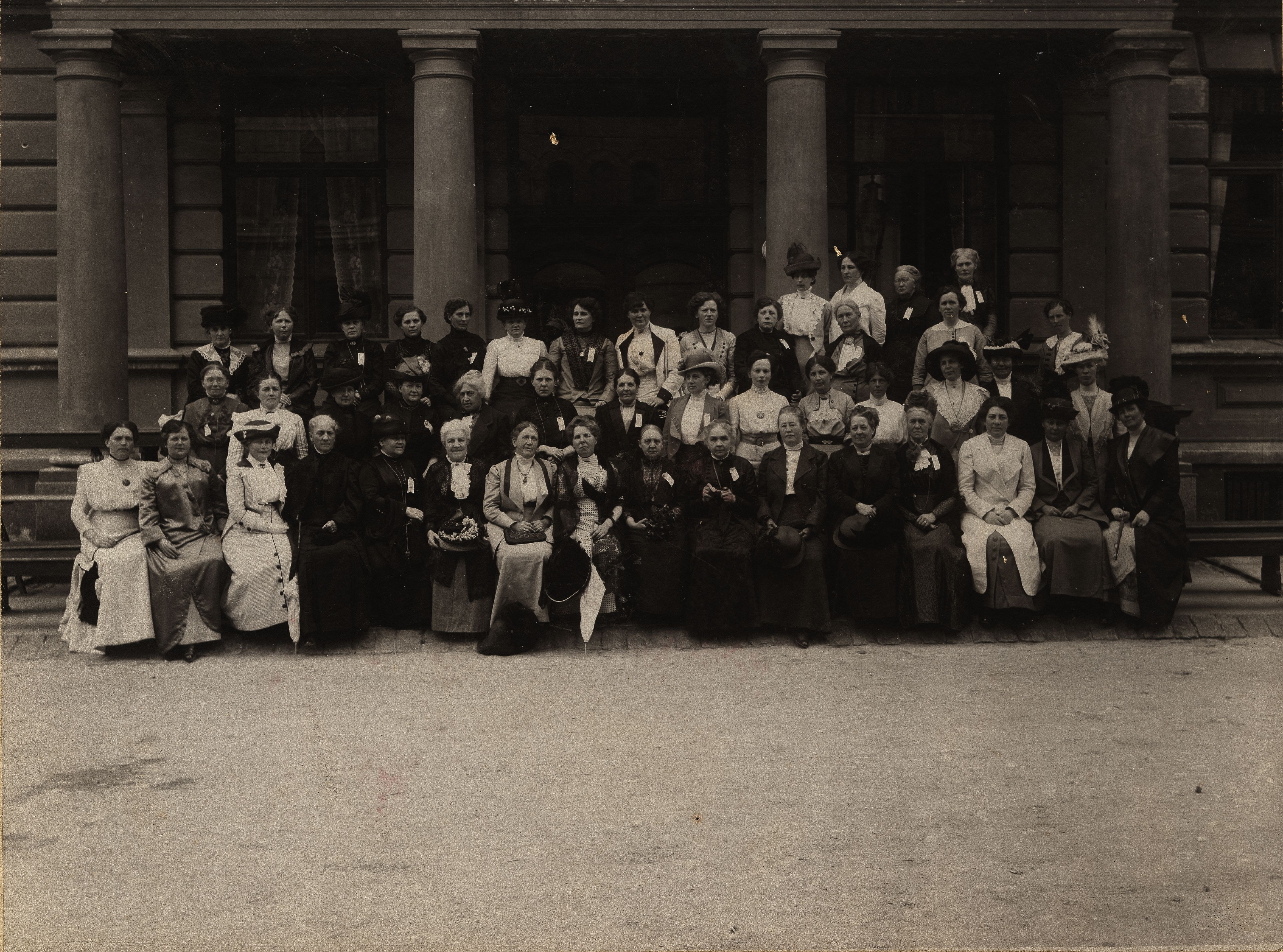 Formann Fredrikke Marie Qvam i første rekke, nr. 9 fra venstre. Ukjent fotograf. Fra arkivet etter Norske Kvinners Sanitetsforening (Arkivref.: PA0379 U4_0496).